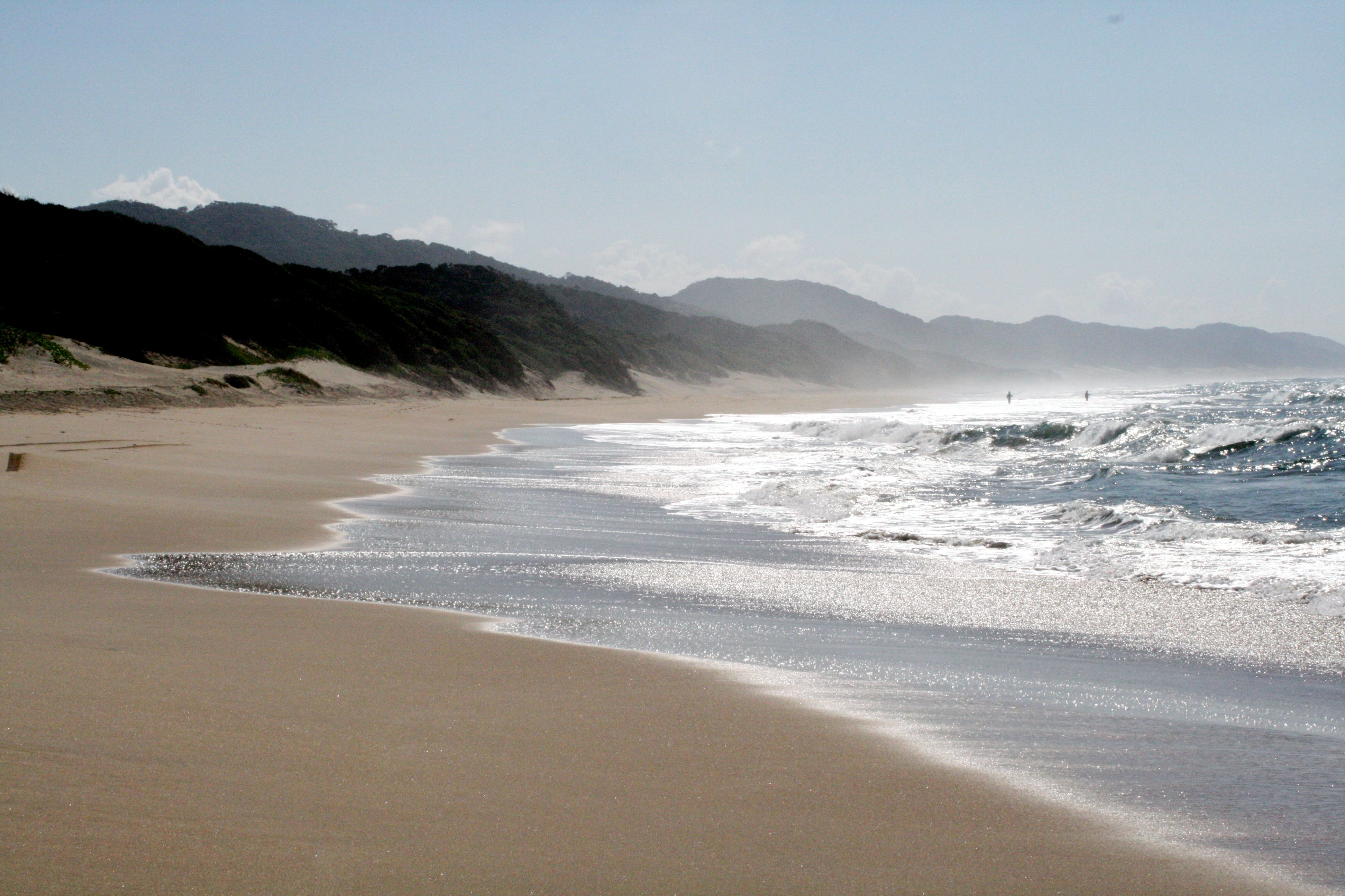 Cape Vidal